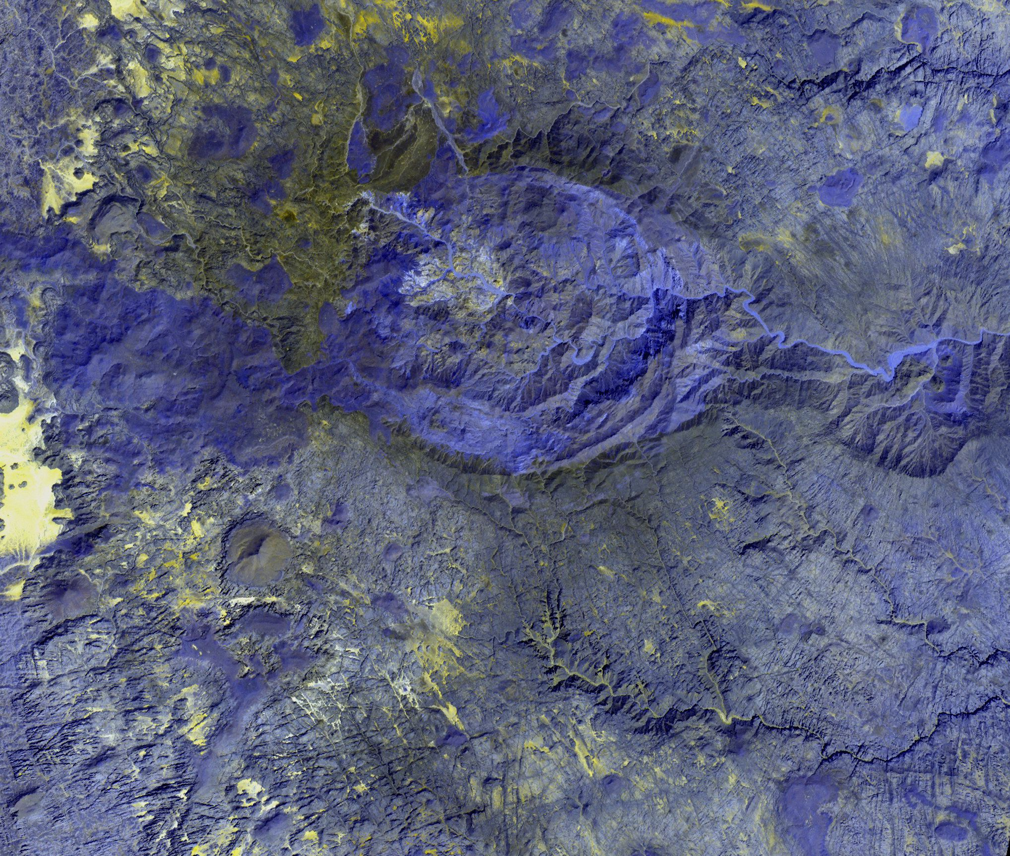 Le Bikku Bitti (à gauche un peu en bas) par TerraLook ASTER (date 2002-10-04)